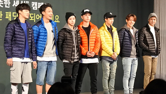 네파 따뜻한 세상 캠페인 론칭 발표회 (IKON)